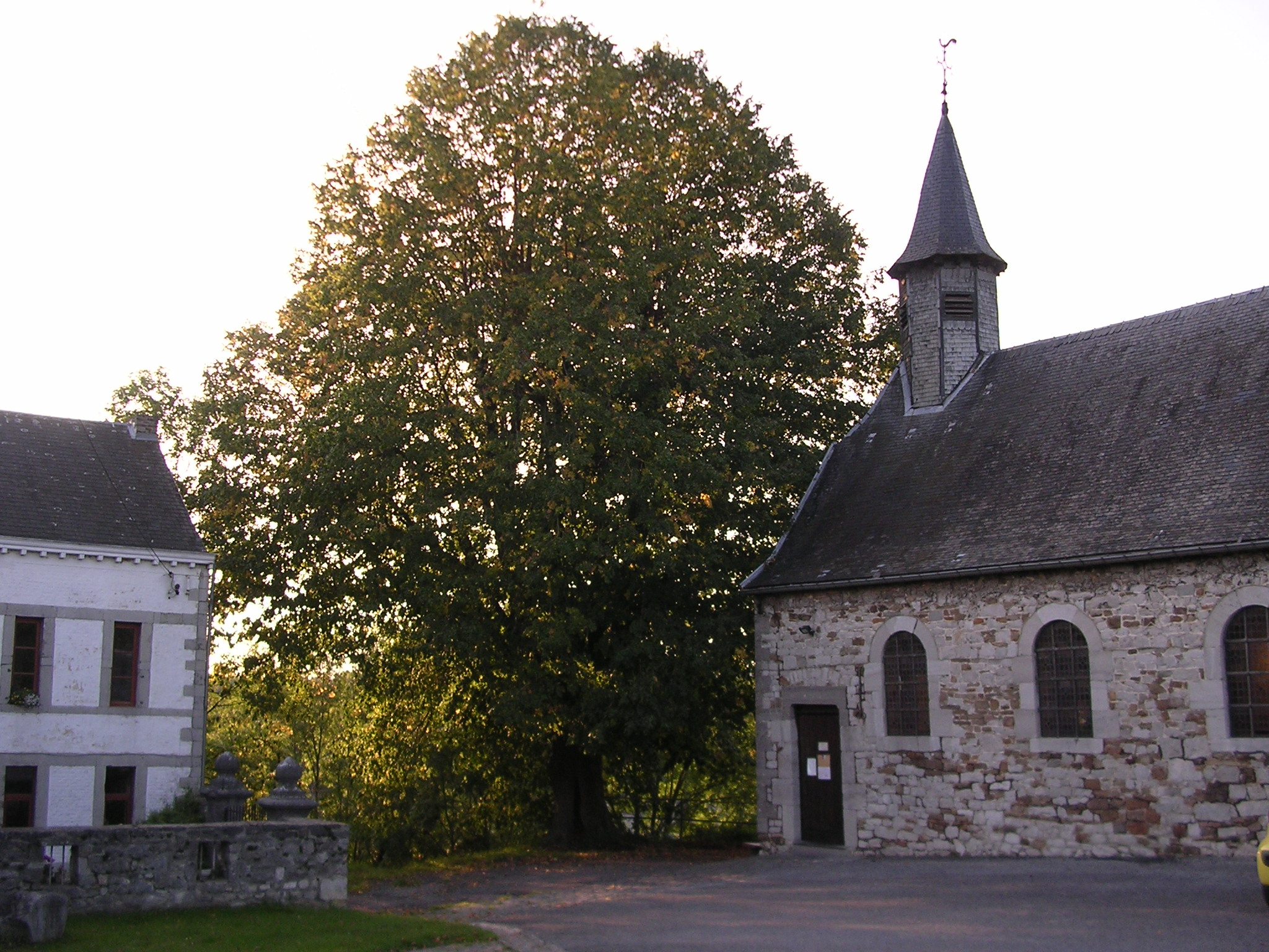 Eglise Saint-Hadelin et ses abords (tilleul, presbytère, place du Fief)